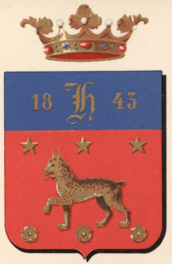 Heinolan vaakuna vuosina 1842–1958